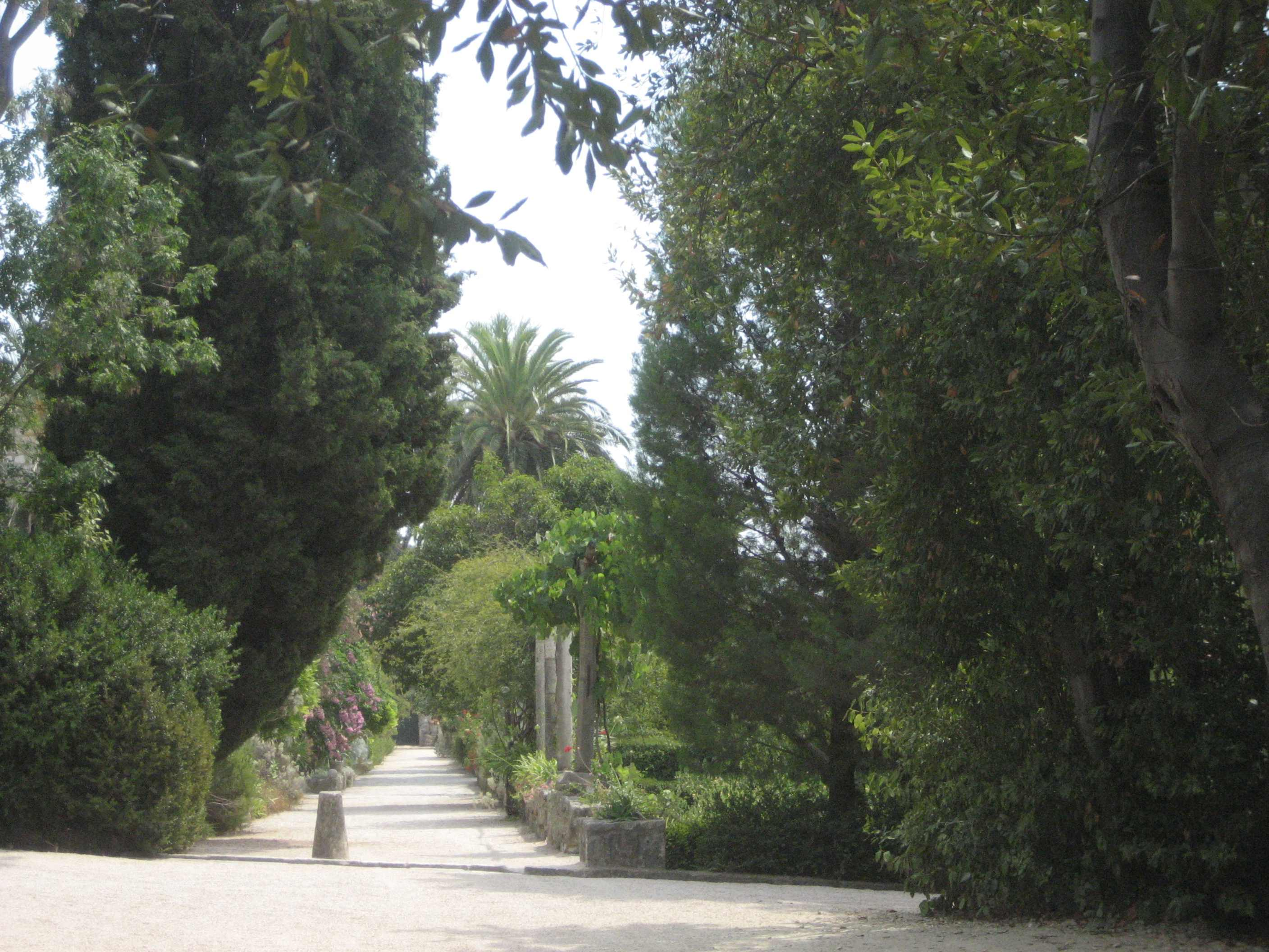 Arboretum Trsteno, Croatia